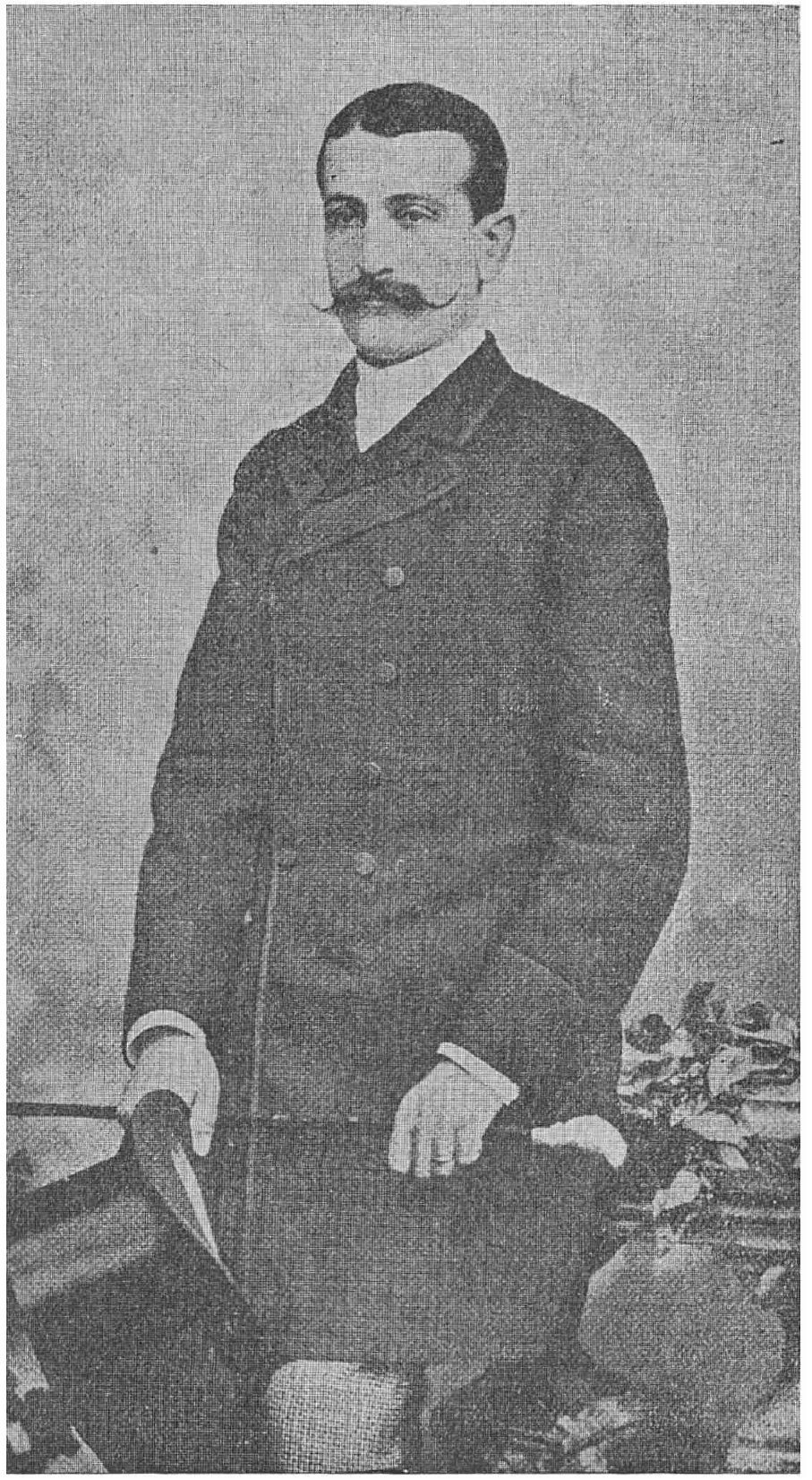 1892 - Take Ionescu, România, ca ministru al instrucţiunii publice şi cultelor (34 de ani)